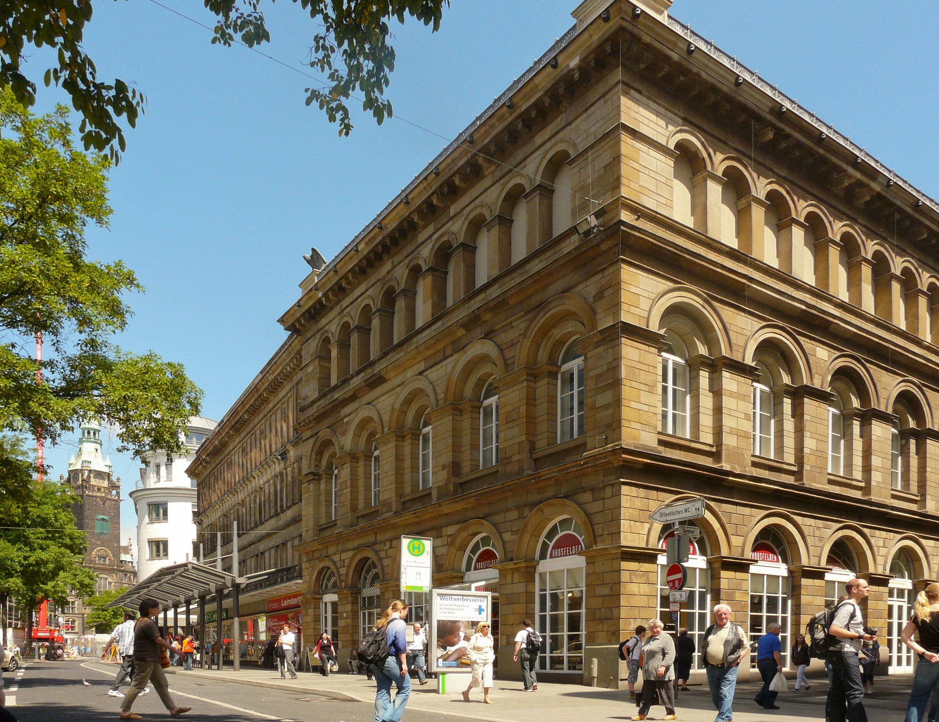 Altes Elberfelder Rathaus, Von der Heydt-Museum, Wuppertal-Elberfeld von Südwesten (Wall) This is a photograph of an architectural monument.It is on the list of cultural monuments of Wuppertal